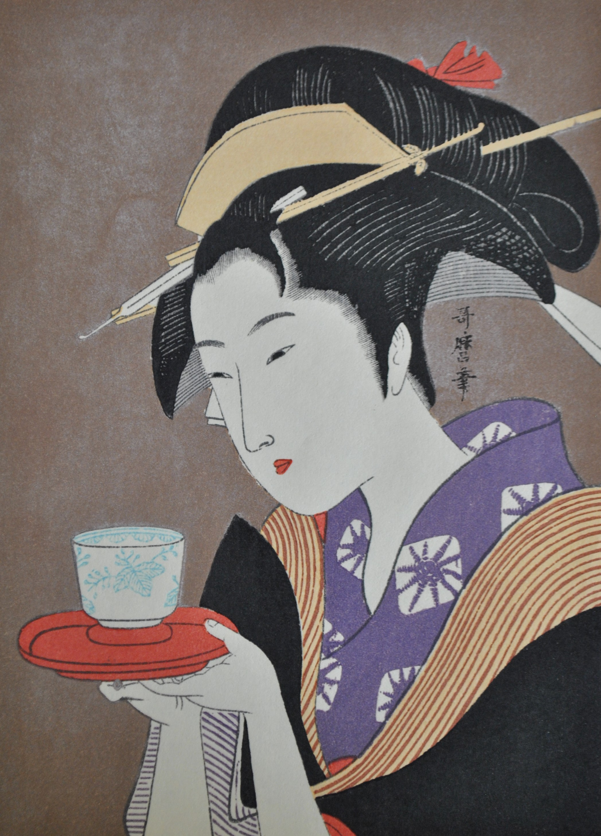 Naniwaya Okita. Estampa Ukiyo-e de Kitagawa Utamaro (1750 - 1806) Período Edo. Naniwaya fue la modelo predilecta de Utamaro, y la representó en numerosas ocasiones, en este caso, portando una taza de té en una bandeja lacada en rojo.